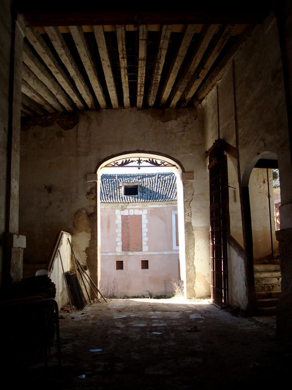 O lo que queda de ella...